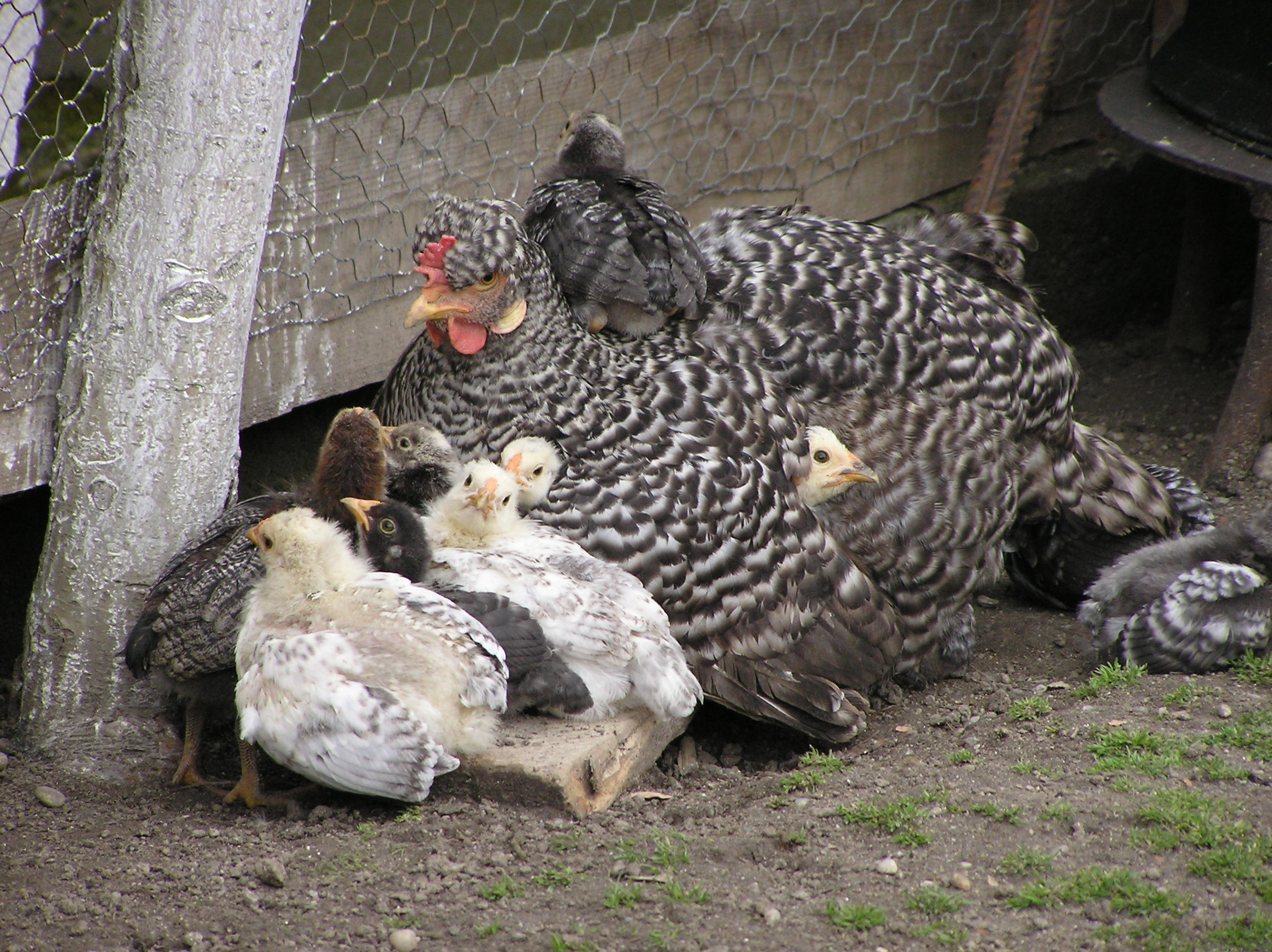 Glucke mit Küken